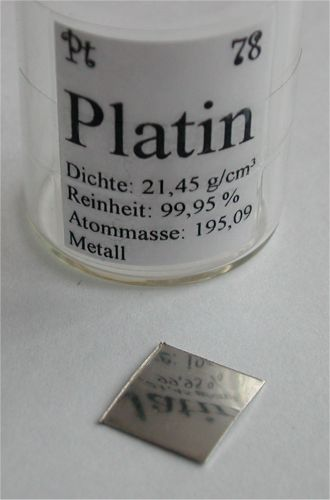 platinum Bildbeschreibung: hochreines Platin-Blech Quelle: selbst fotografiert, aus meiner Sammlung chemischer Elemente Fotograf: Tomihahndorf Datum: März 2006